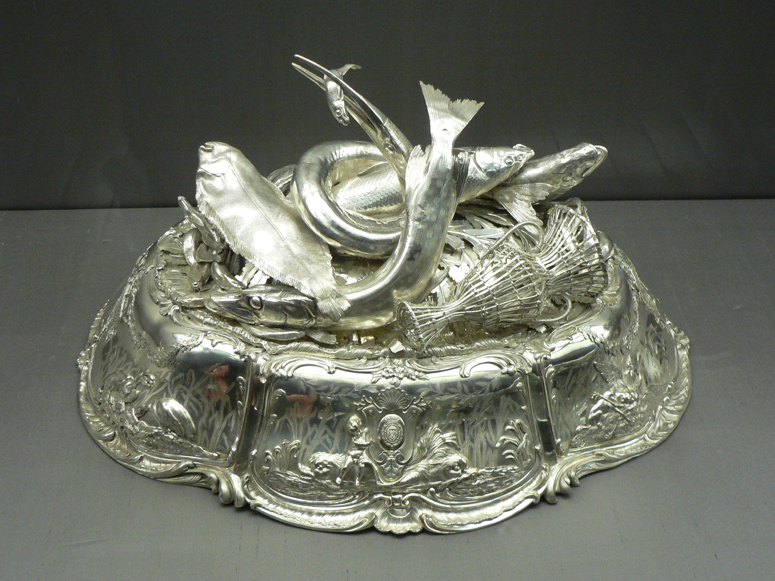 Cloche en argent (couvre-plat), 1765-66 par Antoine-Sébastien Durand, Photographiée à la fondation Calouste Gulbenkian à Lisbonne, Portugal.